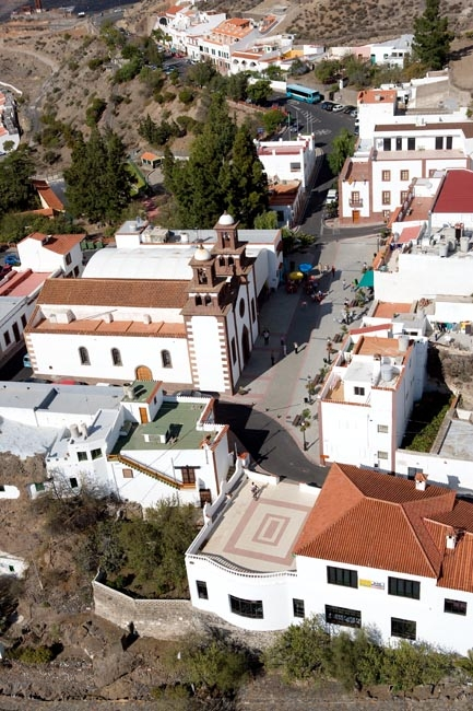 Pueblo de Artenara, Gran Canaria